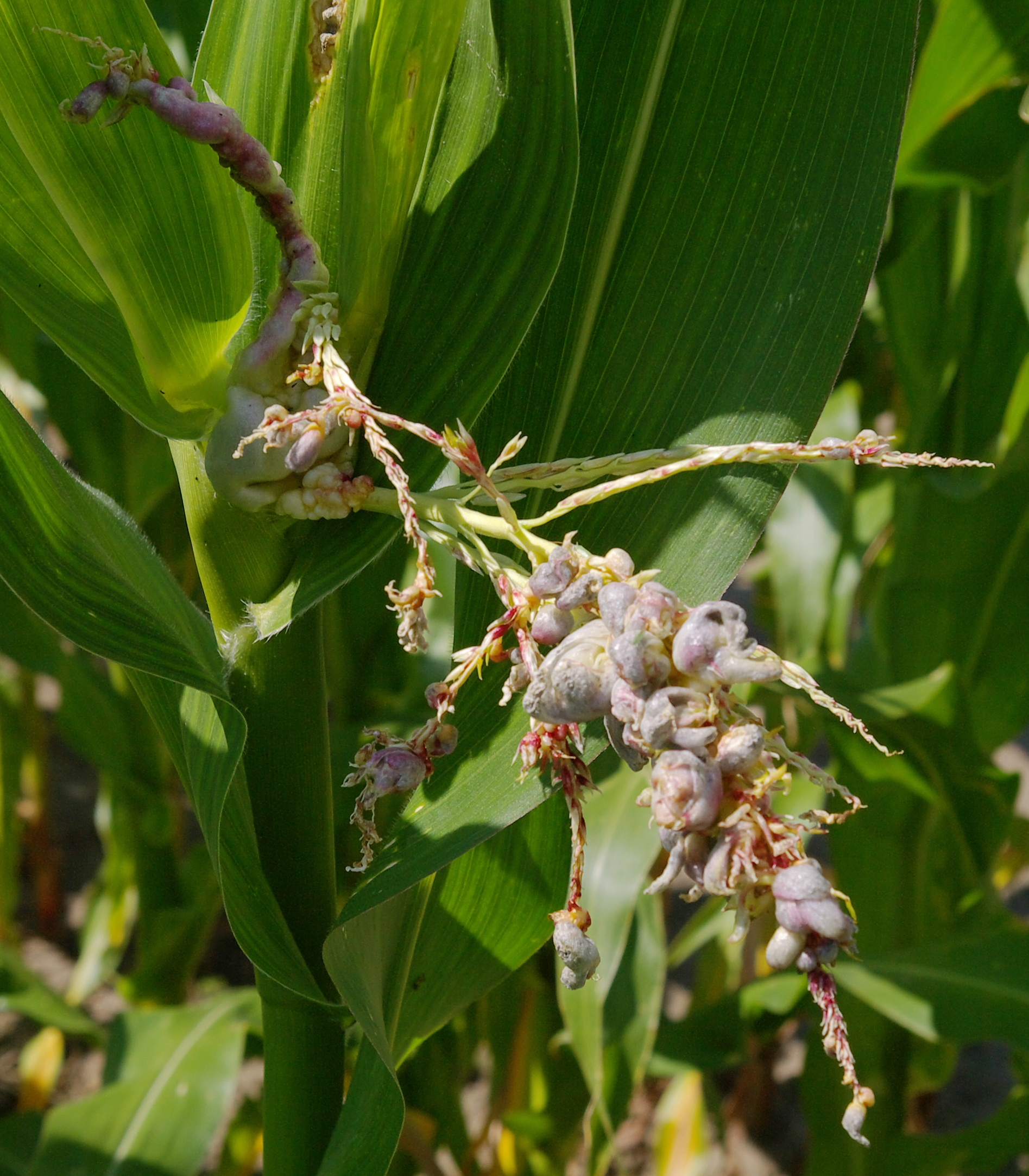 Maisbeulenbrand am männl. Blütenstand einer Futtermaispflanze, gefunden auf Rügen